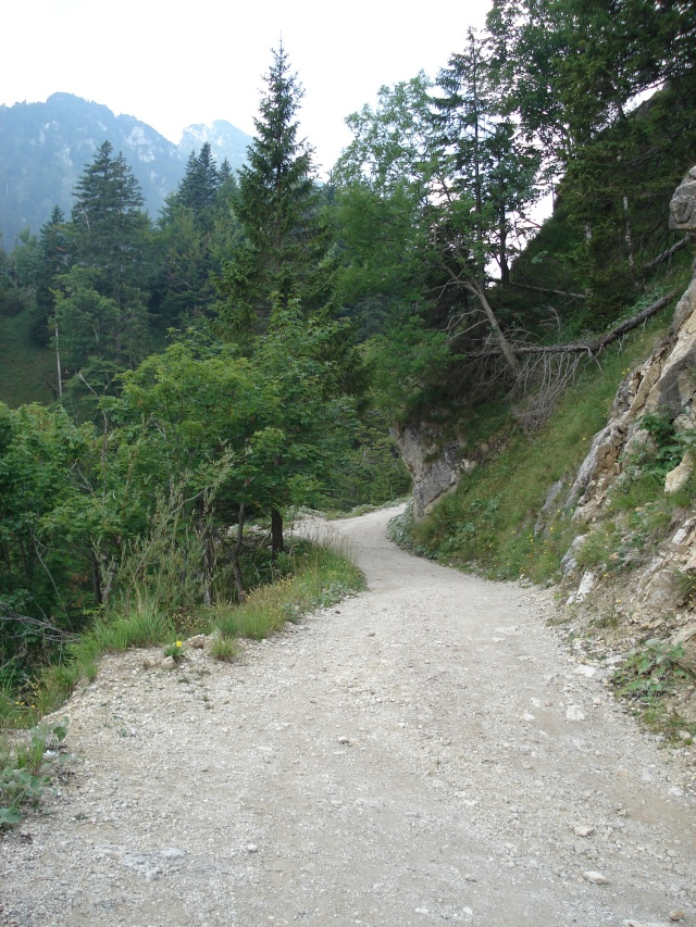 Steiles Stück zwischen Hp. Aipl und der Mitteralm